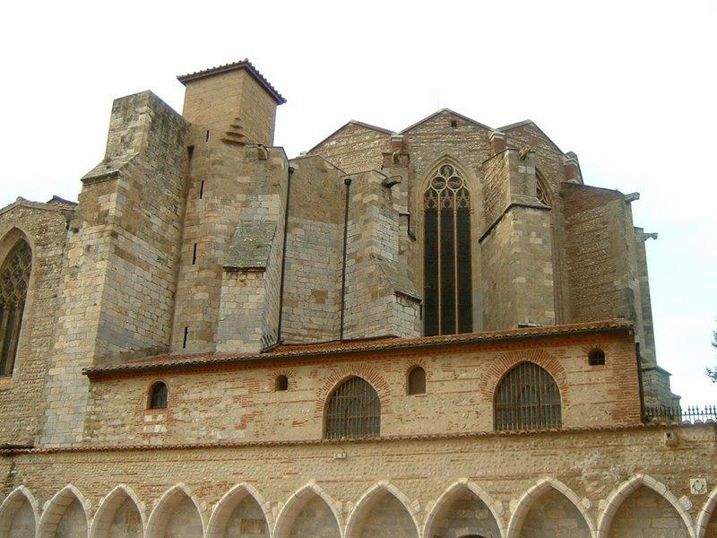 Cathédrale de Perpignan : vue du chevet depuis le Campo Santos